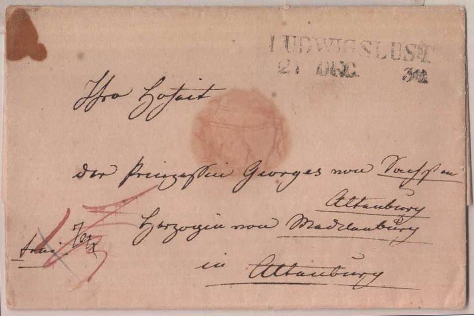 Почтовый конверт, отправленный из Людвигслюста в 1830 году